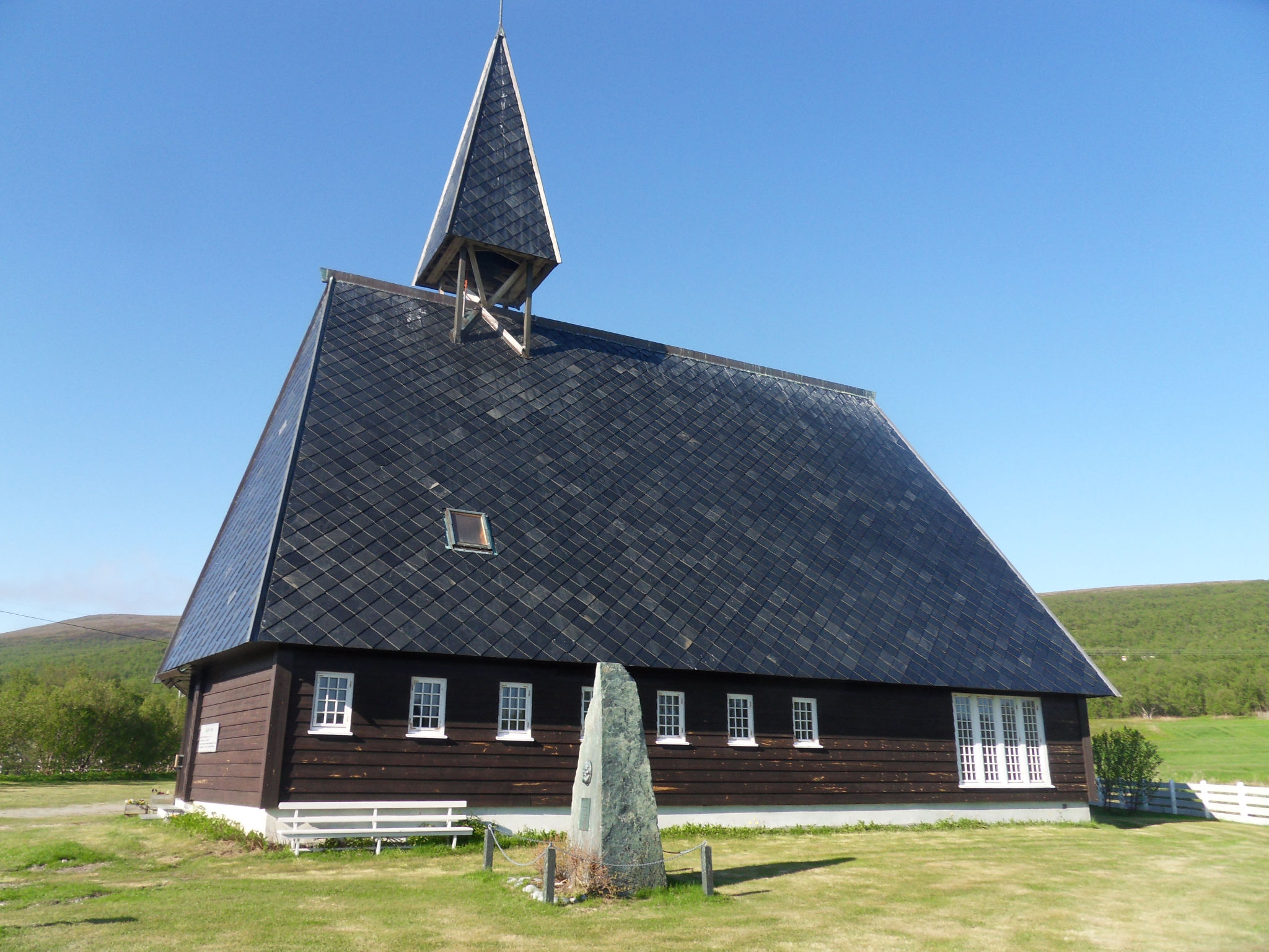 Lebesby kirke er en kirke konstruert i en rektangulær form, fra 1962 i Lebesby kommune, Finnmark fylke. Byggverket er i tre og har 170 plasser. Ved kirken er det en minnestøtte over Lebesbymannen.